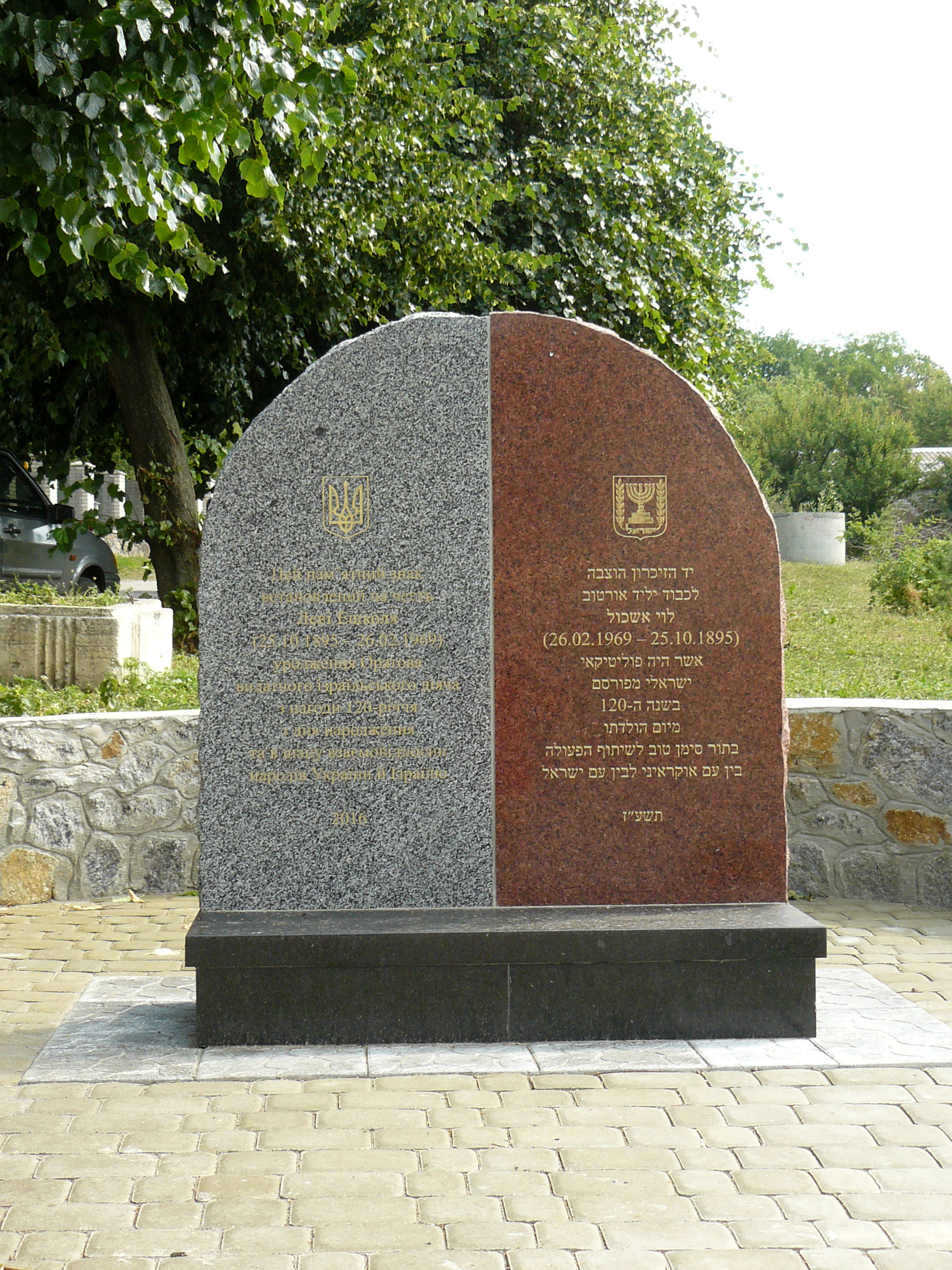 Пам`ятний знак на честь Леві Ешкол, Оратів